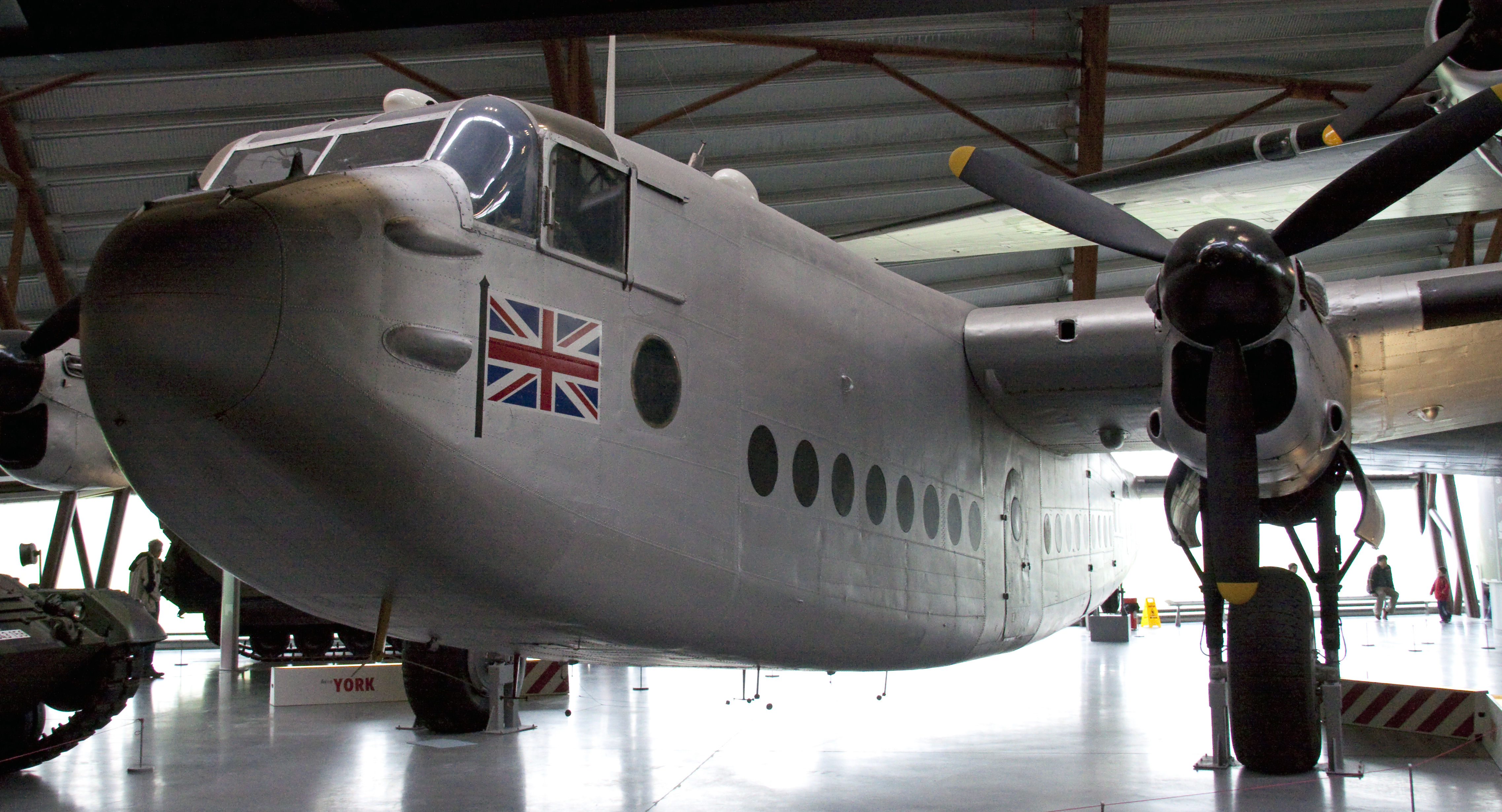 Avro York